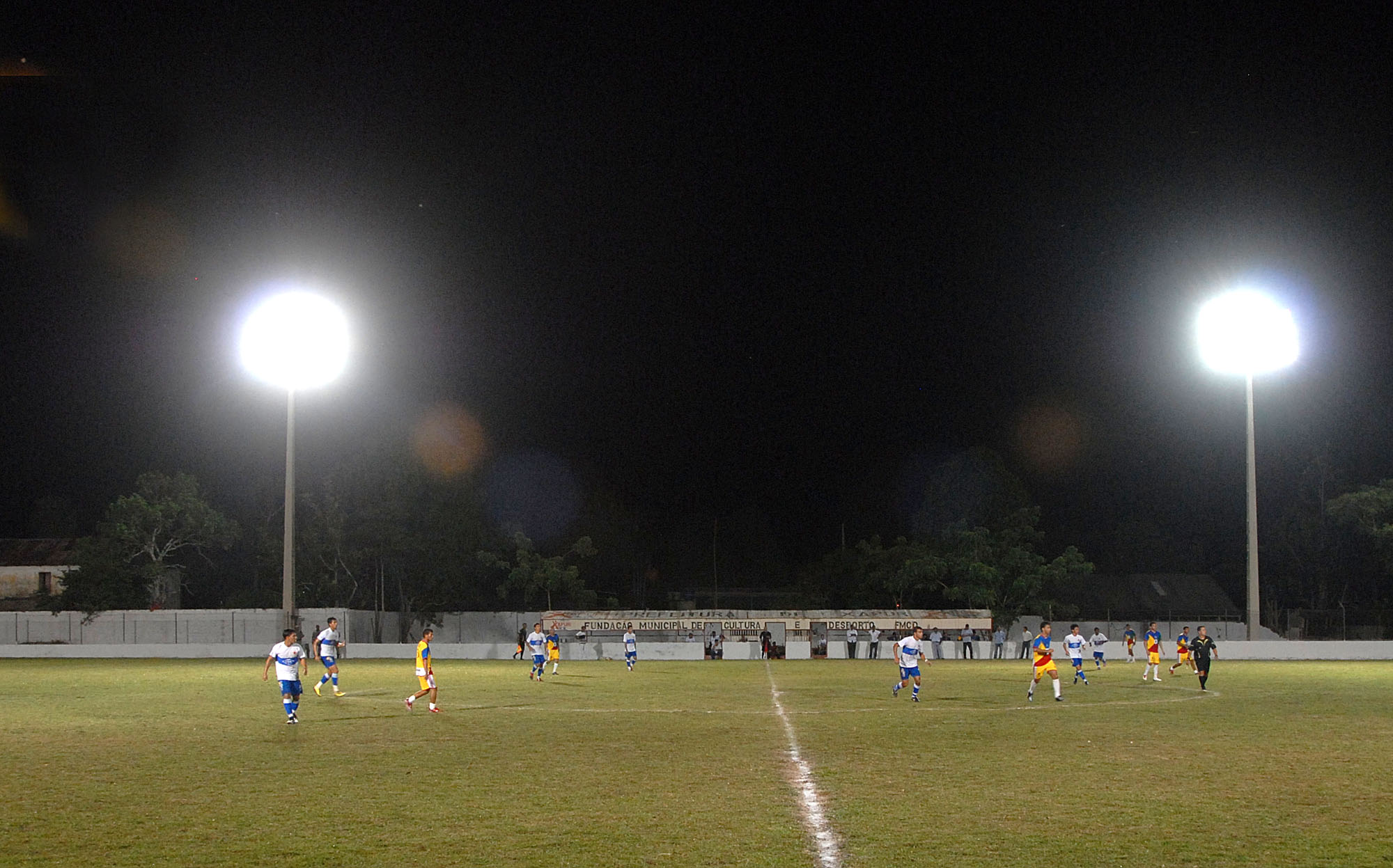 Foto: Gleilson Miranda